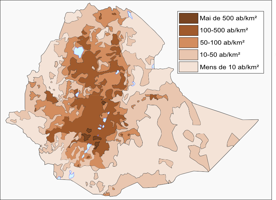 Densitat de populacion d'Etiopia en 2007.